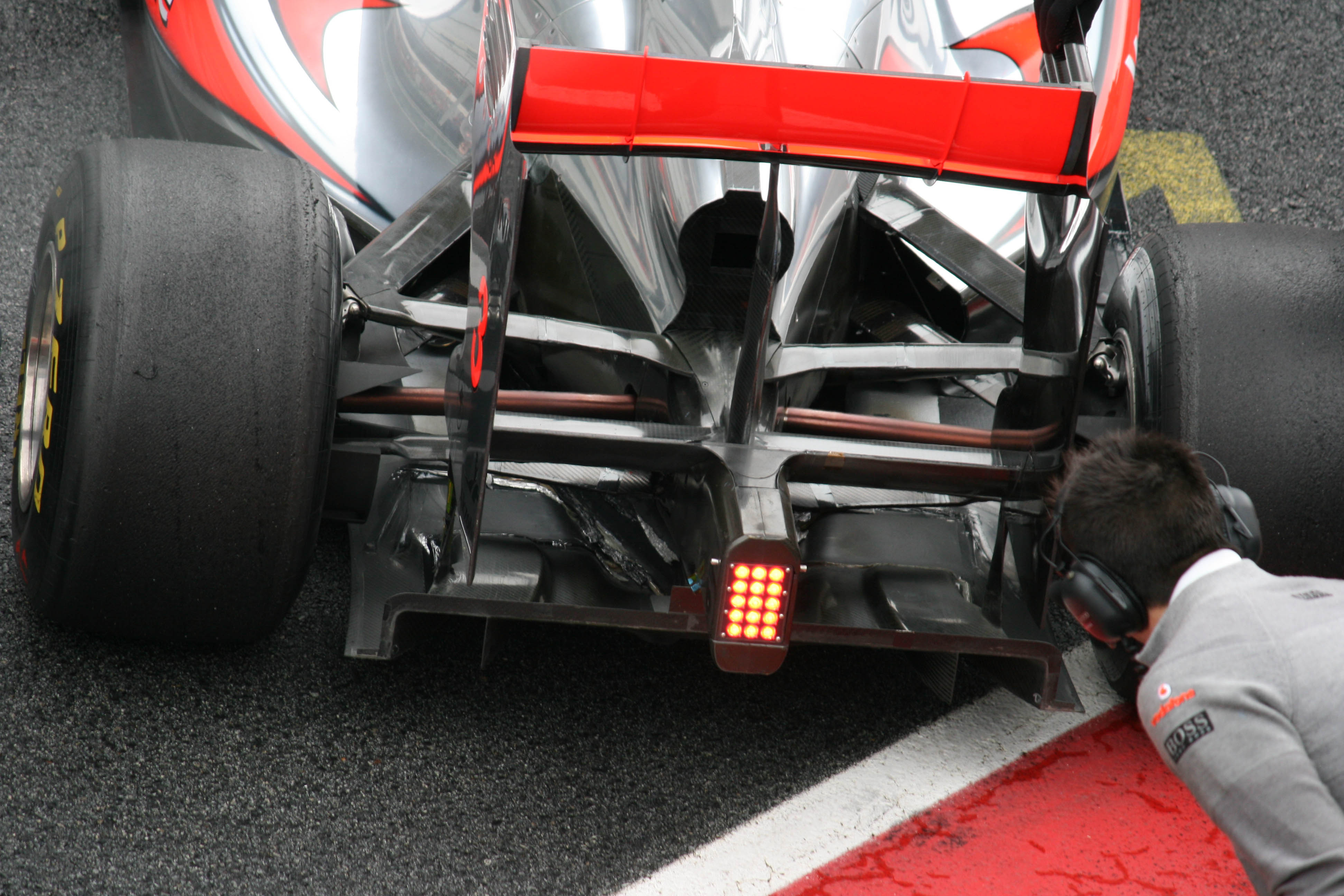 Mclaren